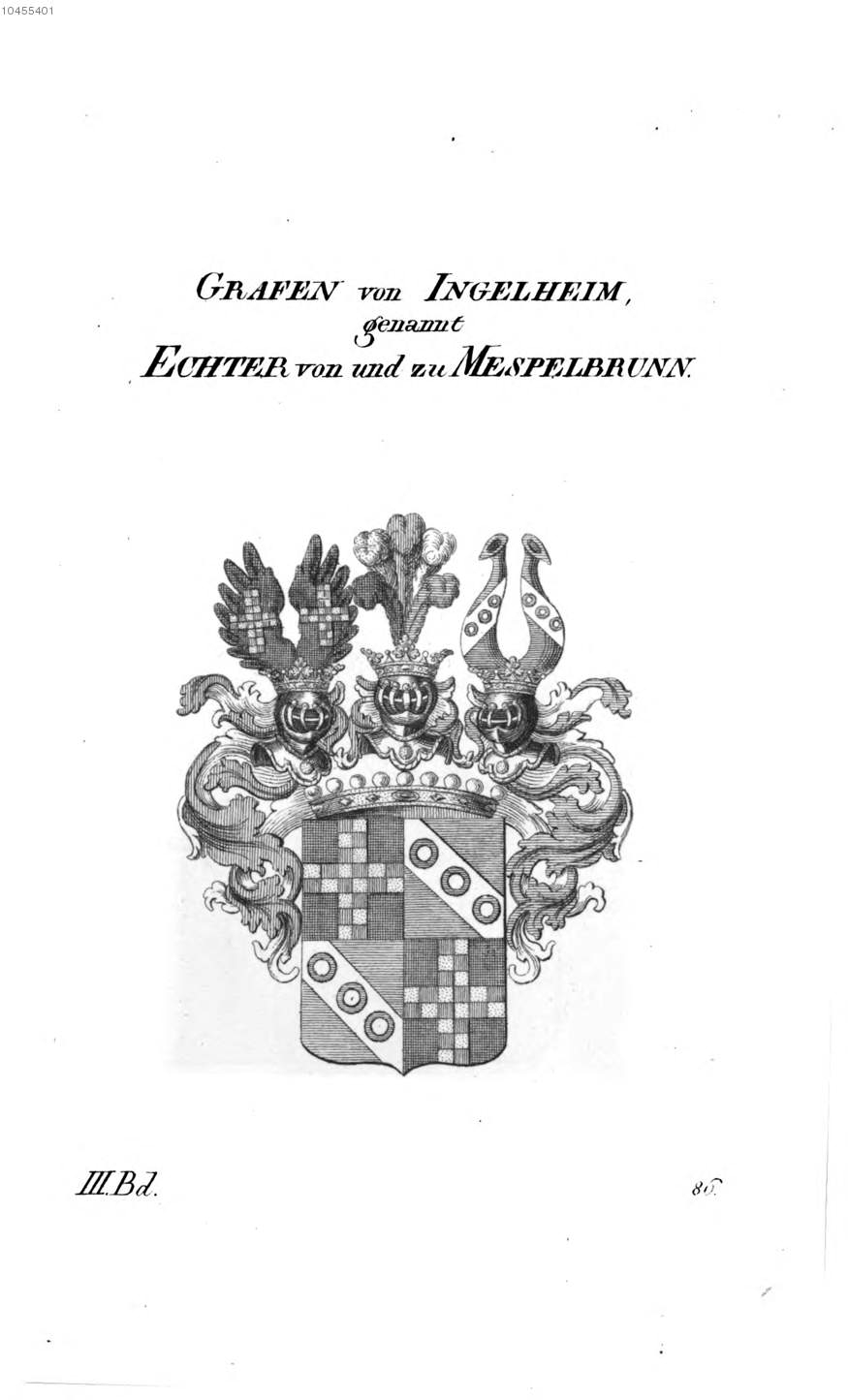 Wappen Ingelheim Echter von Mespelbrunn - Tyroff AT.jpg